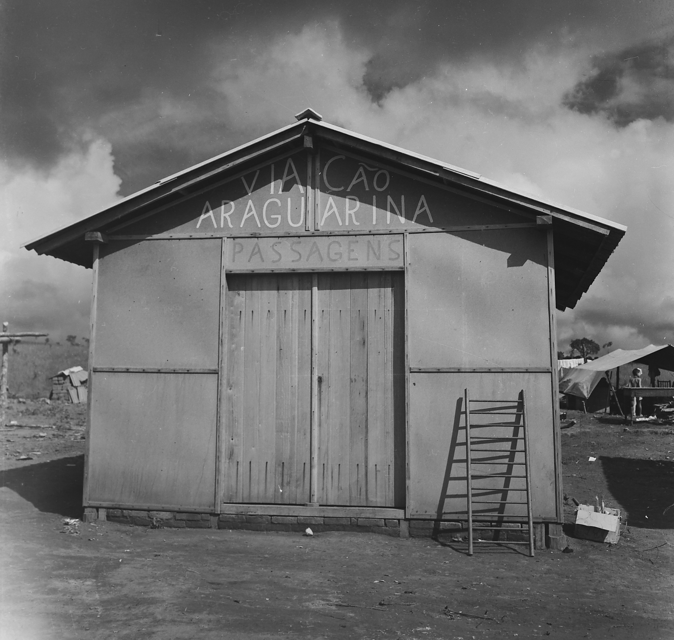 Imagem do Fundo Agência Nacional, do Arquivo Nacional